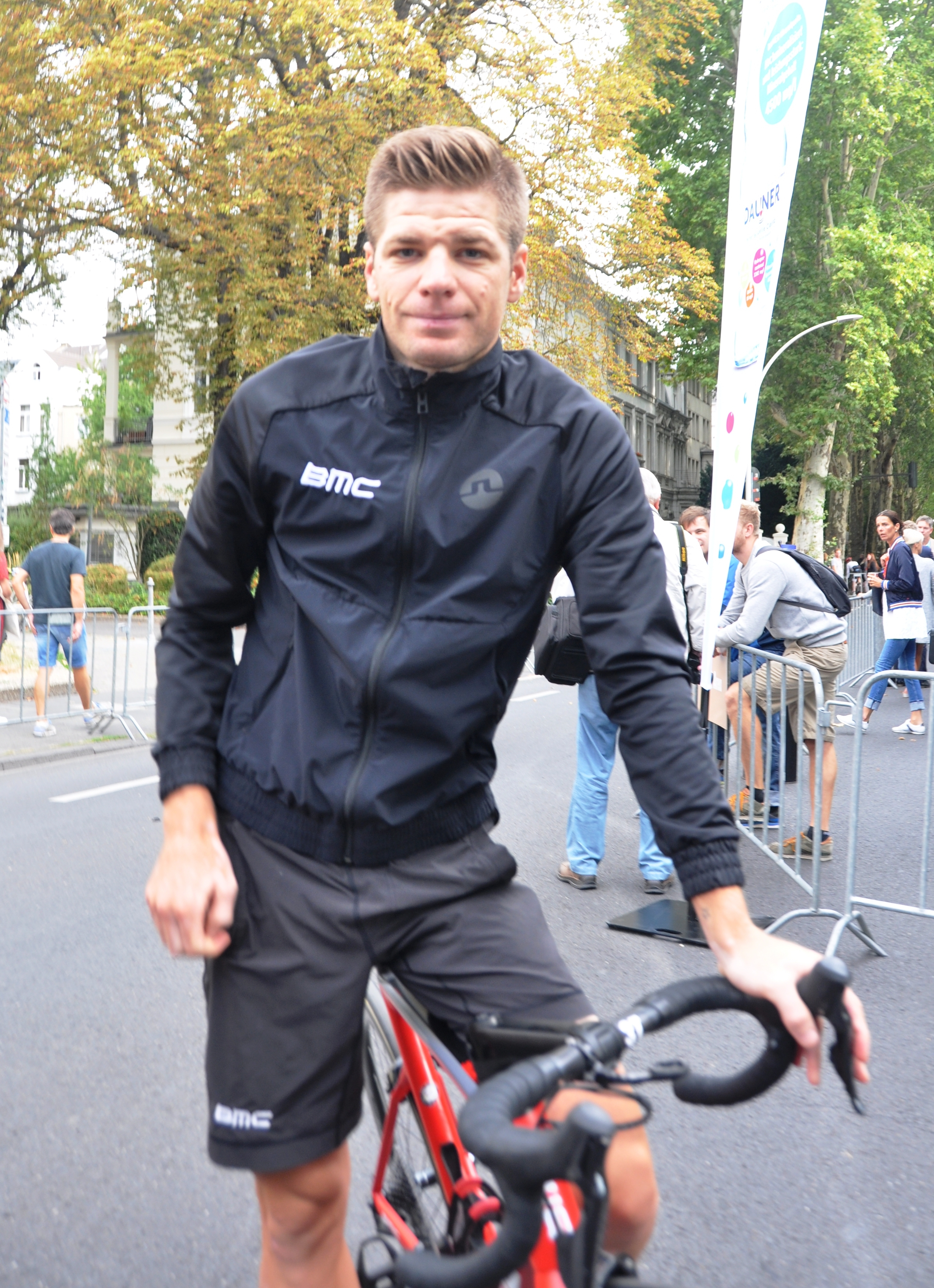 Jürgen Roehlandts, belgische Radrennfahrerin